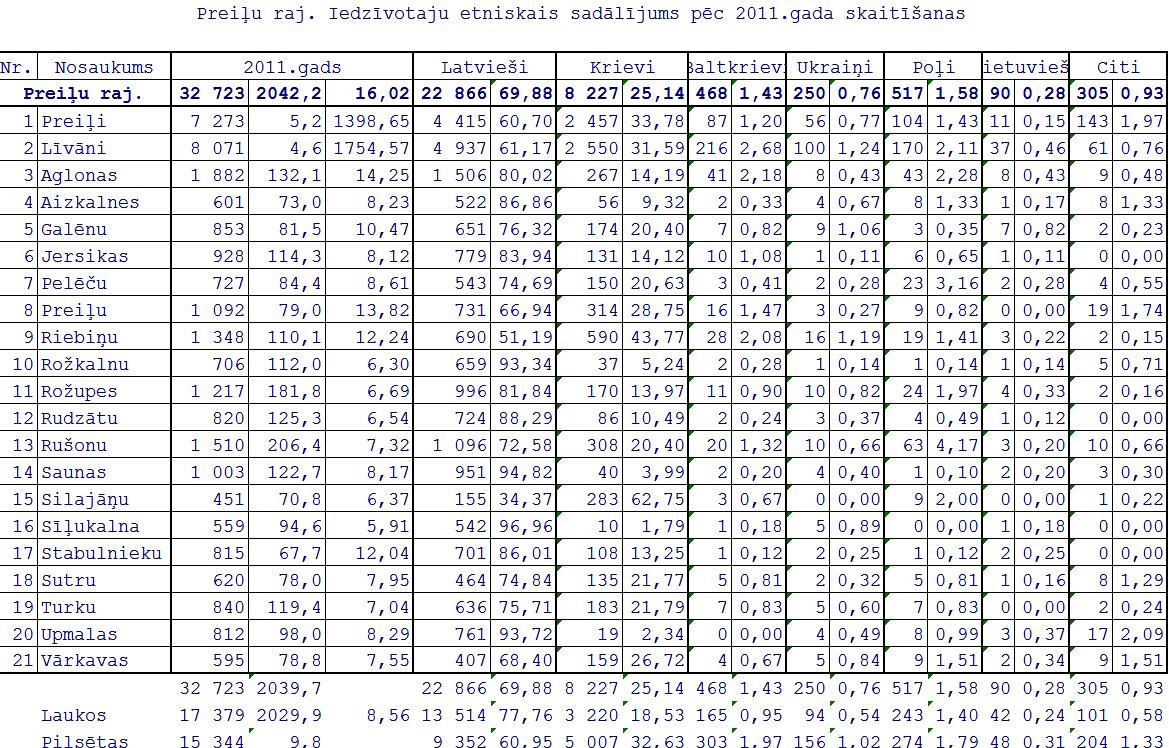 Latvijas 2011 gada tautas skaitīšanas dati